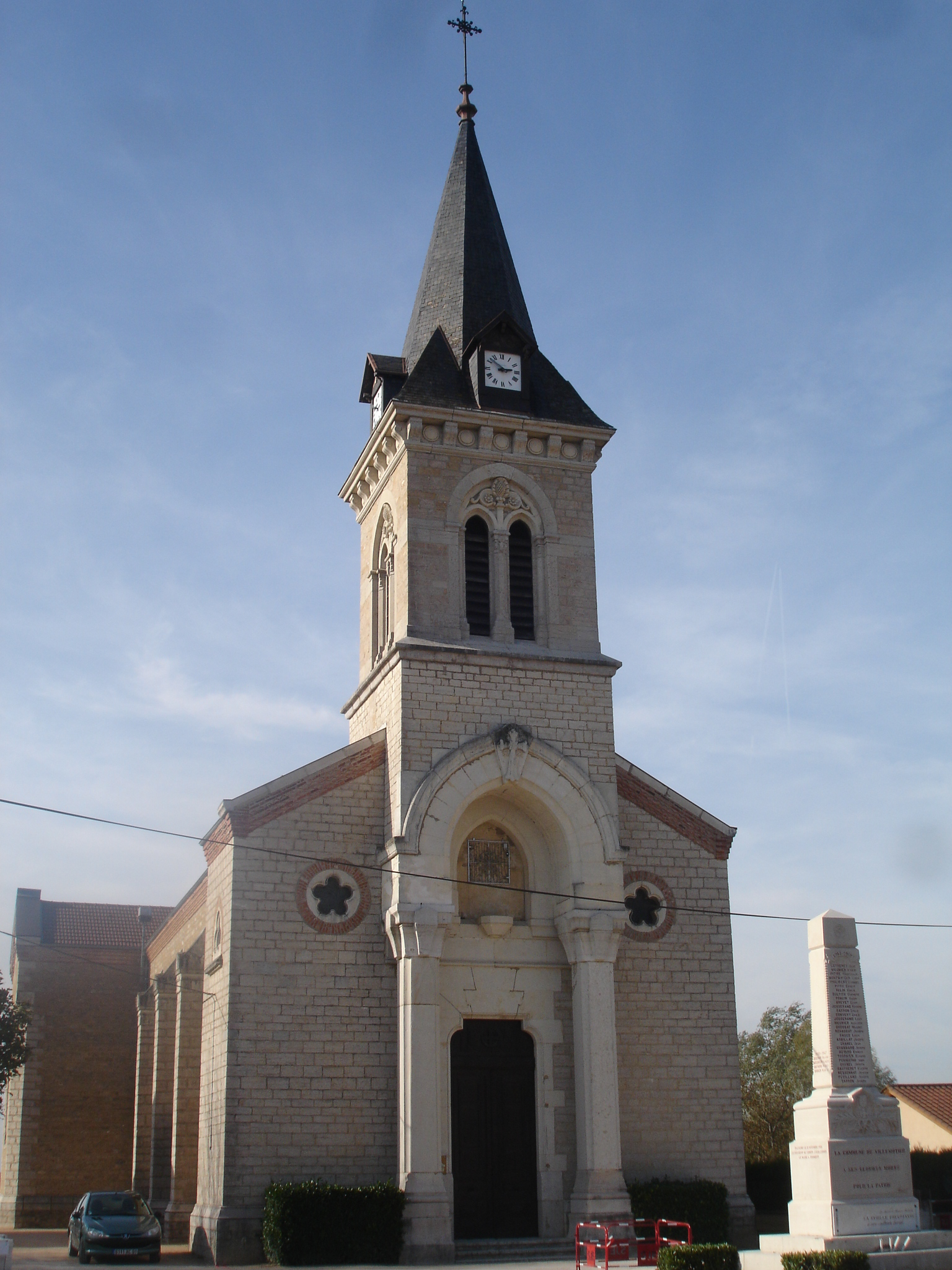 Villemotier (Ain) : l'église